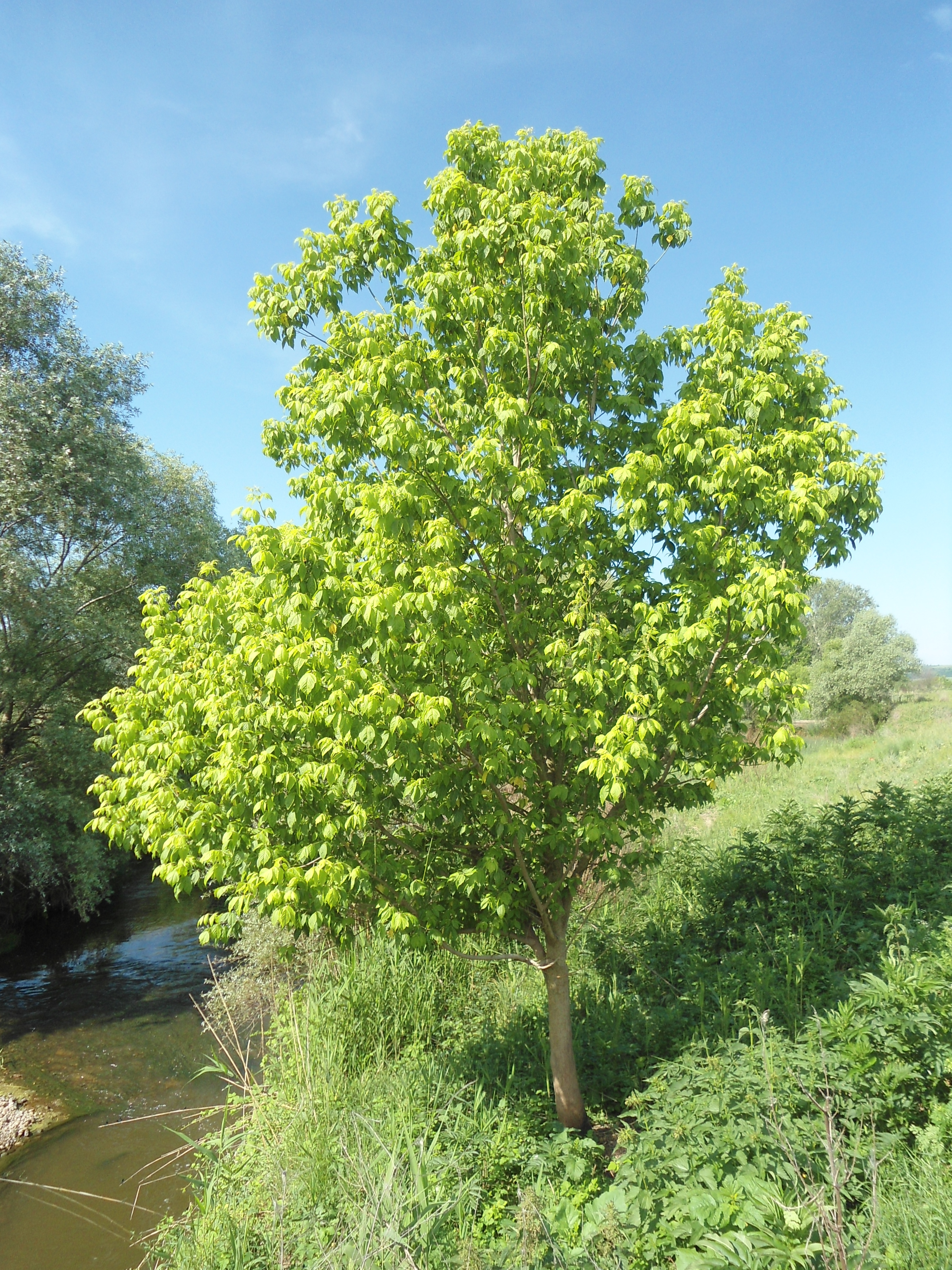 Фиданка на ясенолистен явор (Acer negundo).